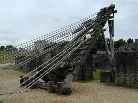 Römischer Baukran aus Xanten, Rekonstruktion, eigene Aufnahme vom 05.06.2004.